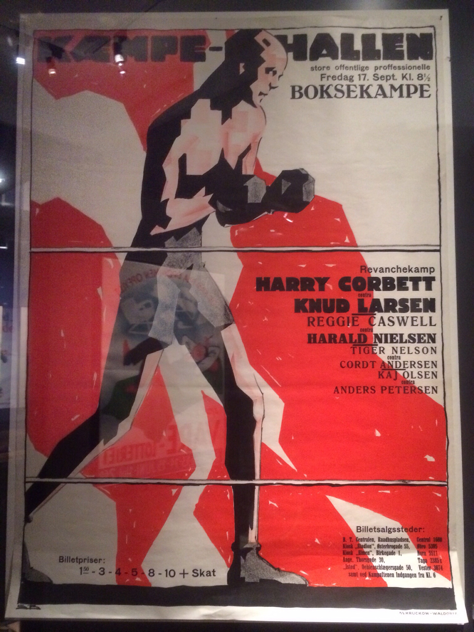 Plakat boksestævne i Kæmpehallerne (Københavns Forum) for boksekamp mellem Knud Larsen og Harry Corbett 17. september 1929